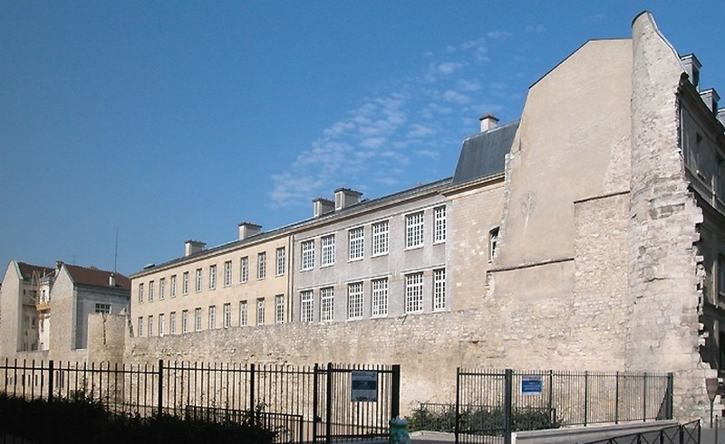 Le mur de Philippe Auguste aujourd'hui : vestige principal, le long du collège Charlemagne (IVe arrt, rive droite), dégagé en 1946.